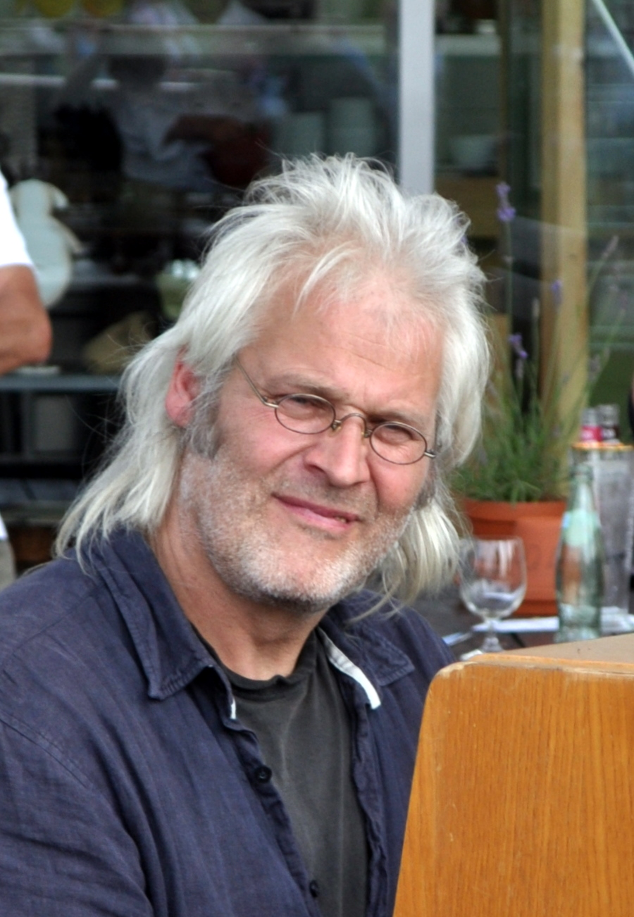 Der Musiker Thomas Putensen auf dem Hoffest 2011 des Landwerthofes in Stahlbrode (Vorpommern) am 16. Juli 2011.